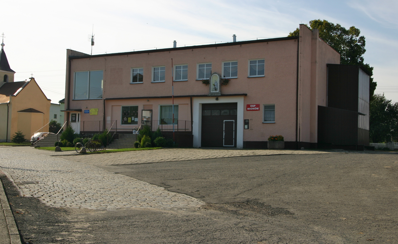 Mionów (dodatkowa nazwa w j. niem. Polnisch Müllmen) – wieś w Polsce położona w województwie opolskim, w w powiecie prudnickim, w gminie Głogówek.